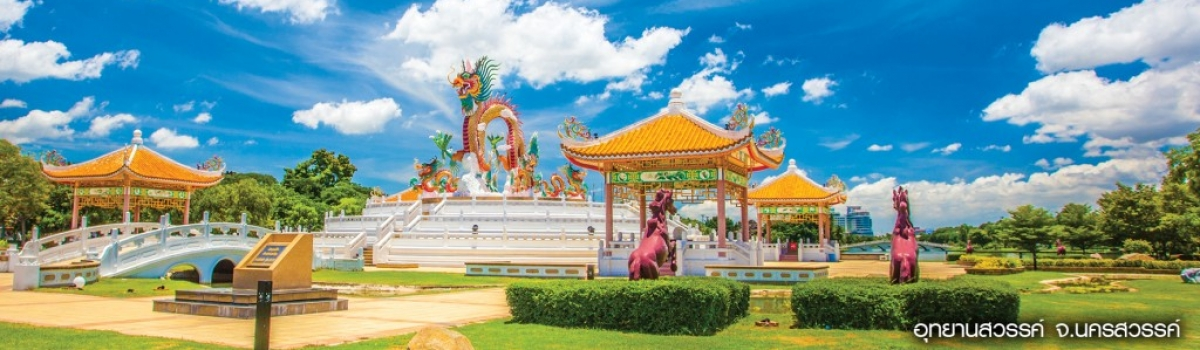 อุทยานสวรรค์